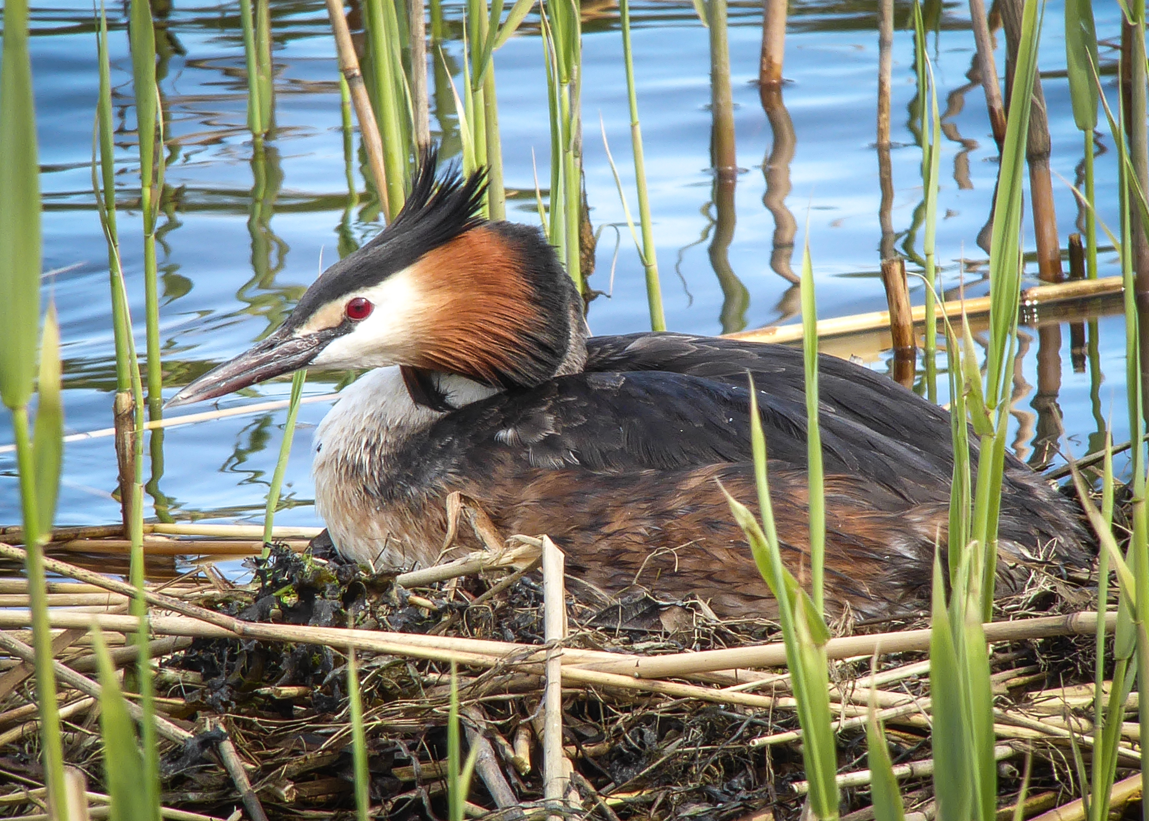 Skäggdopping (Podiceps cristatus) på bo i Malmfjärden i Kalmar.